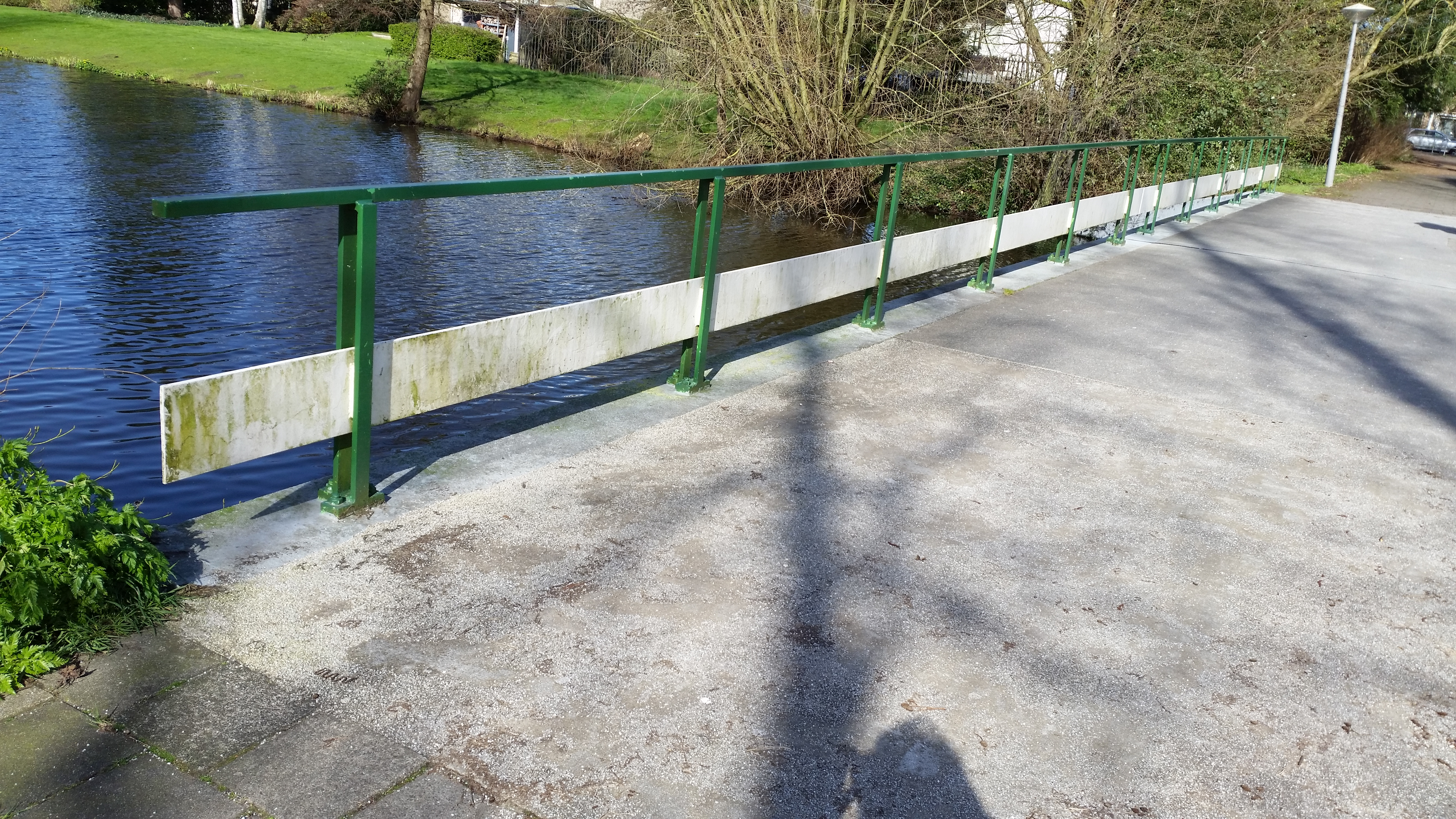 Impressie van Brug 812 tussen de De Cusertraat en Kalfjeslaan in Amsterdam-Zuid.